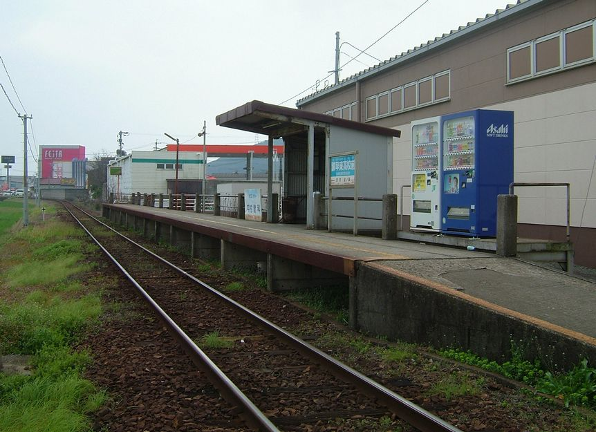 島原鉄道諫早東高校前駅